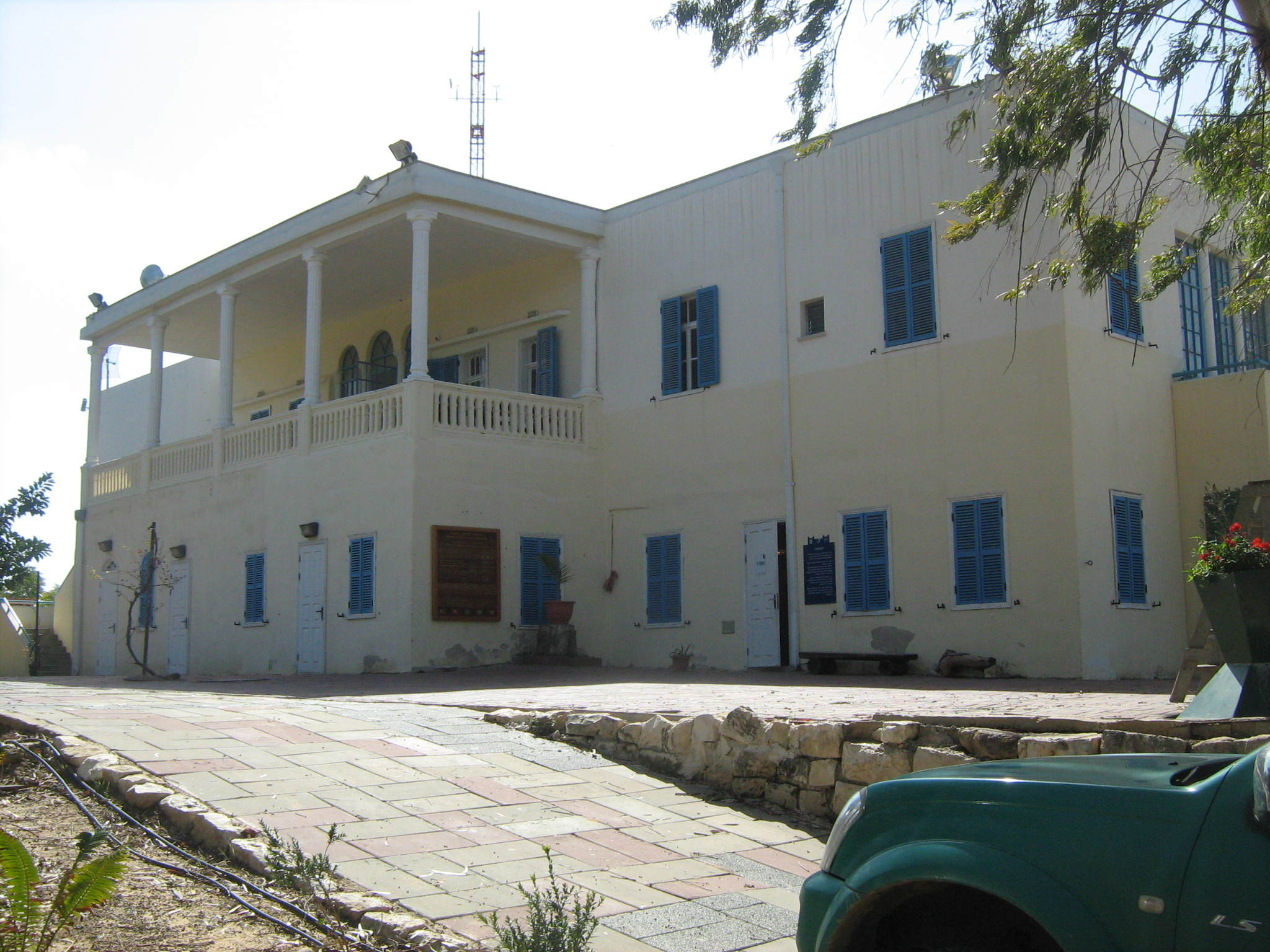 ניצנים